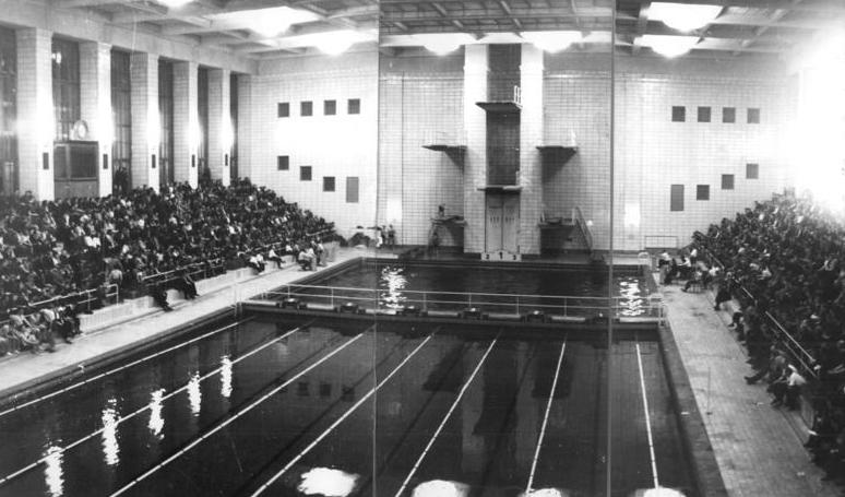 Rostock, Schwimmhalle "Neptun", Innenansicht Zentralbild Funck 23.11.1955 Europas modernste Schwimmhalle entsteht in Rostock In der deutschen Hafenstadt Rostock wurde am Abend des 6. Gründungstages der Deutschen Demokratischen Republik, dem 7. Oktober 1955, die Schwimmhalle "Neptun" seiner Bestimmung übergeben. Das Rostocker Bad ist nach den modernsten technischen Erkenntnissen erbaut. Neben einer 25-m-Bahn gibt es ausserdem ein Sprungbassin. Als einzige Halle Deutschlands ist es dort möglich, Sprünge vom 10-m-Brett durchzuführen. 1 600 (eins sechs null null) Zuschauer haben von allen Plätzen gute Sichtmöglichkeiten. Der Komplex soll noch weiter ausgebaut werden, so dass dort die modernste Schwimmhalle Europas entsteht. UBz: Ein Überblick über die neue Schwimmhalle "Neptun" (Panorama)